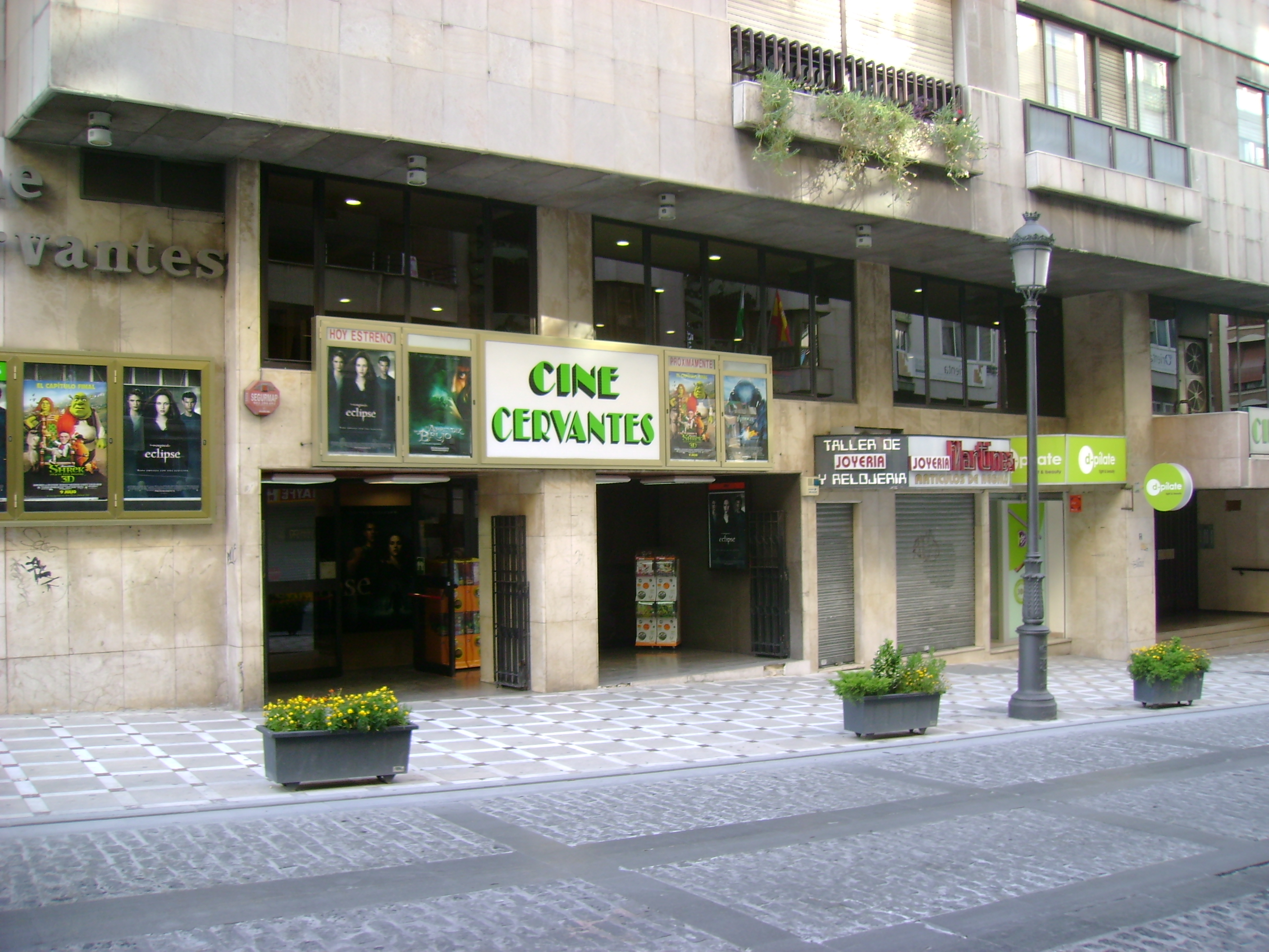 Cine Cervantes en la calle Bernabé Soriano de Jaén.